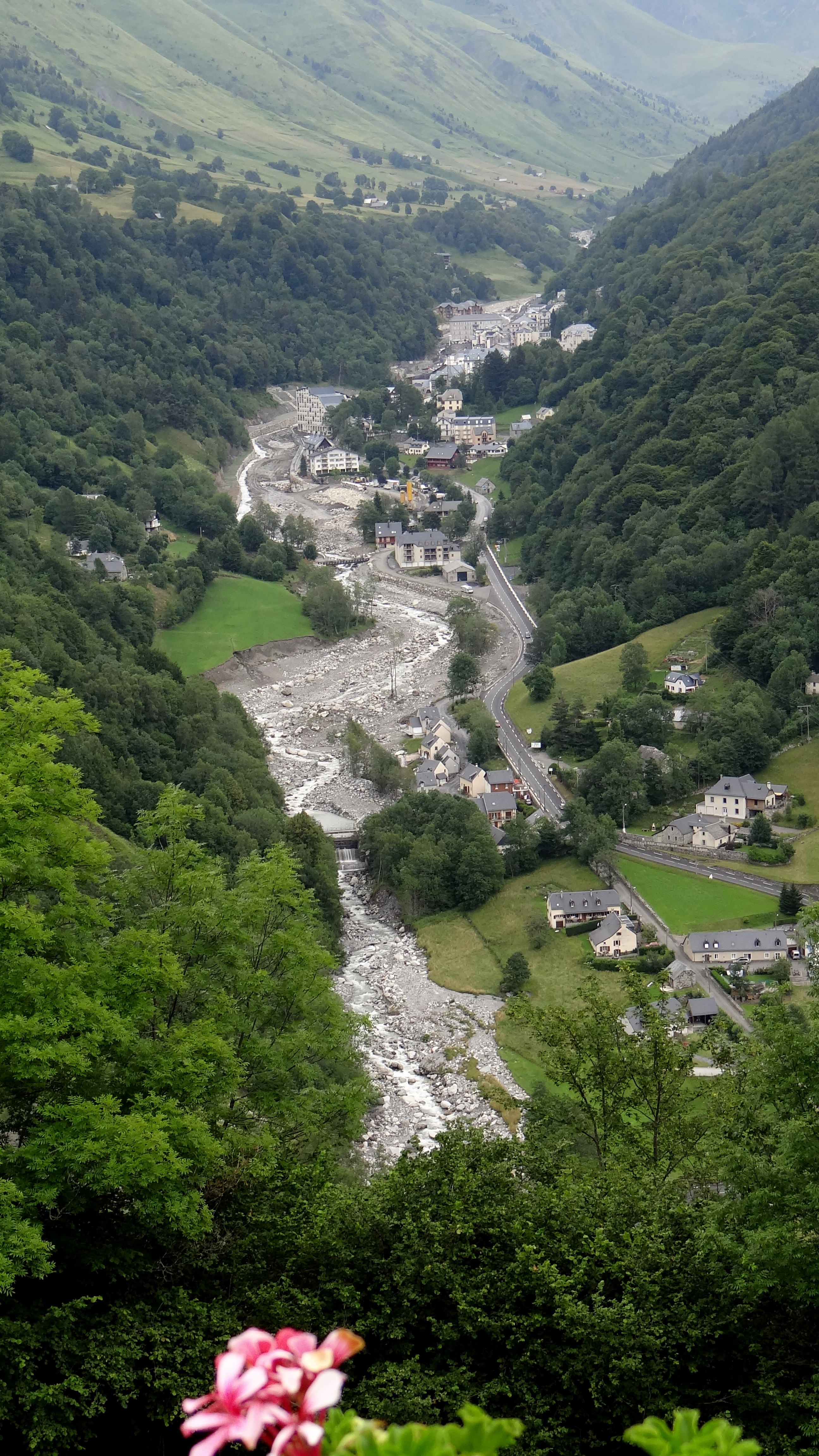 Vue du Tournaboup sur le Bastan et Barèges